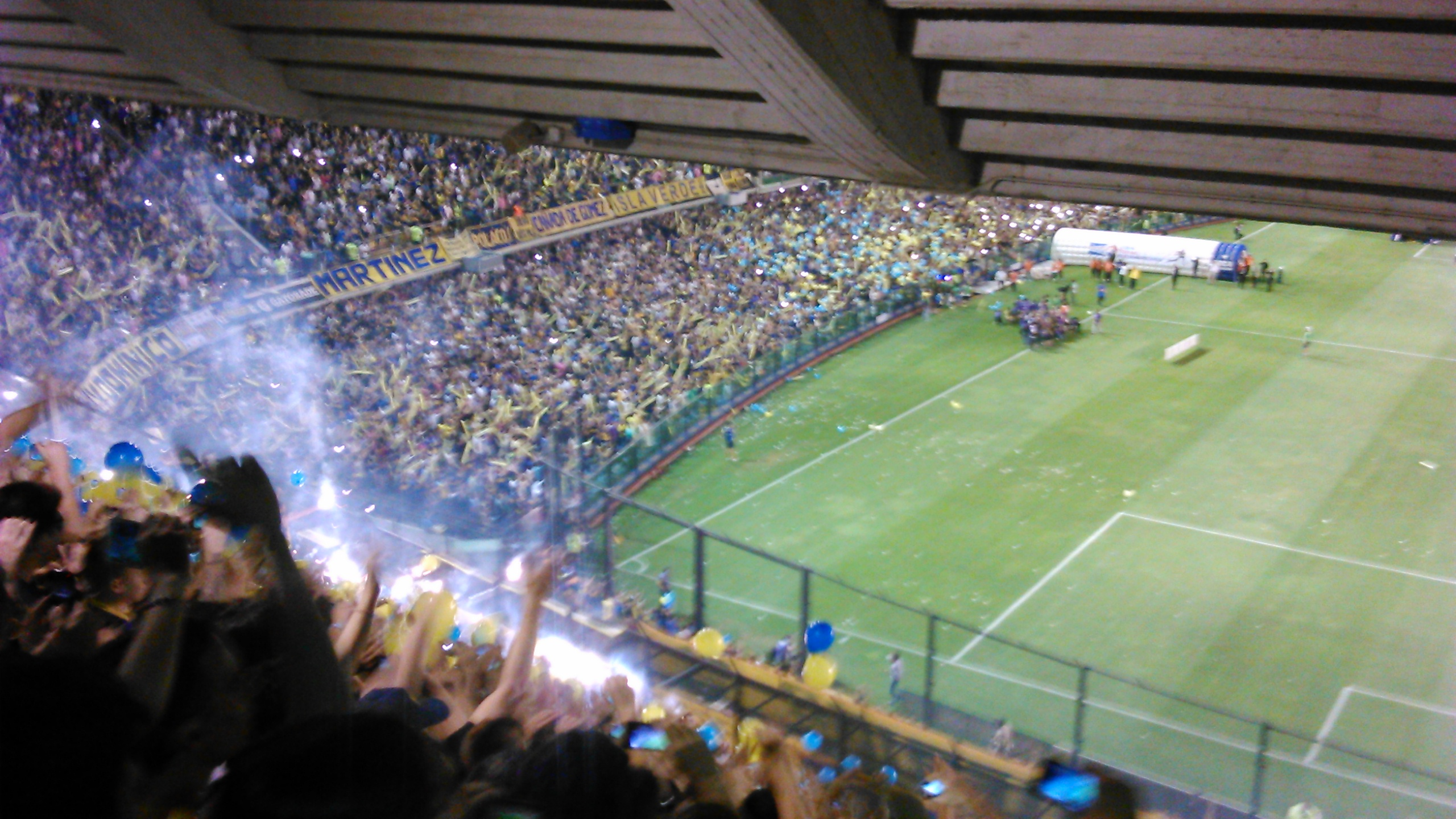 Imagen del Alberto J. Armando, a minutos de salida de Boca; Boca vs River; Sudamericana 2014